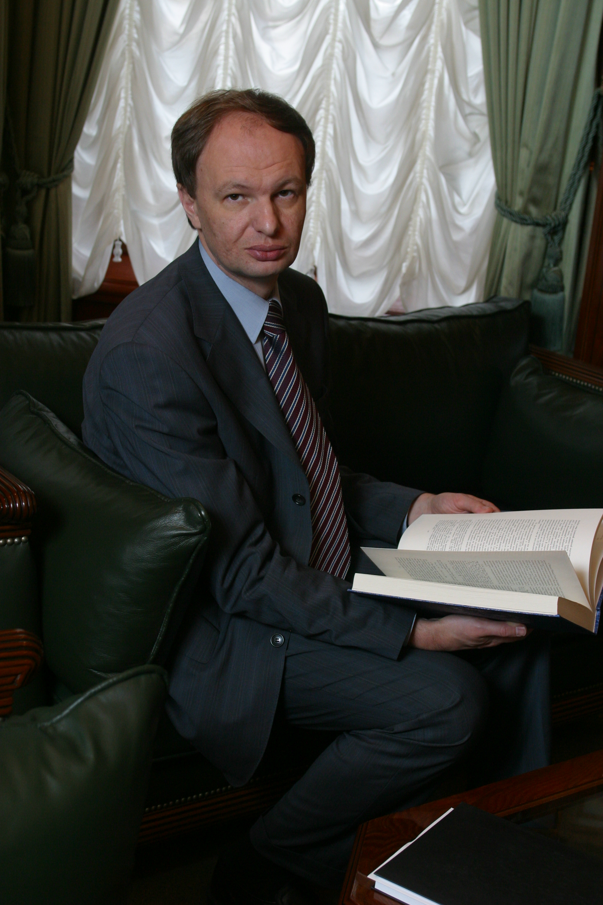 Михаил Сеславинский